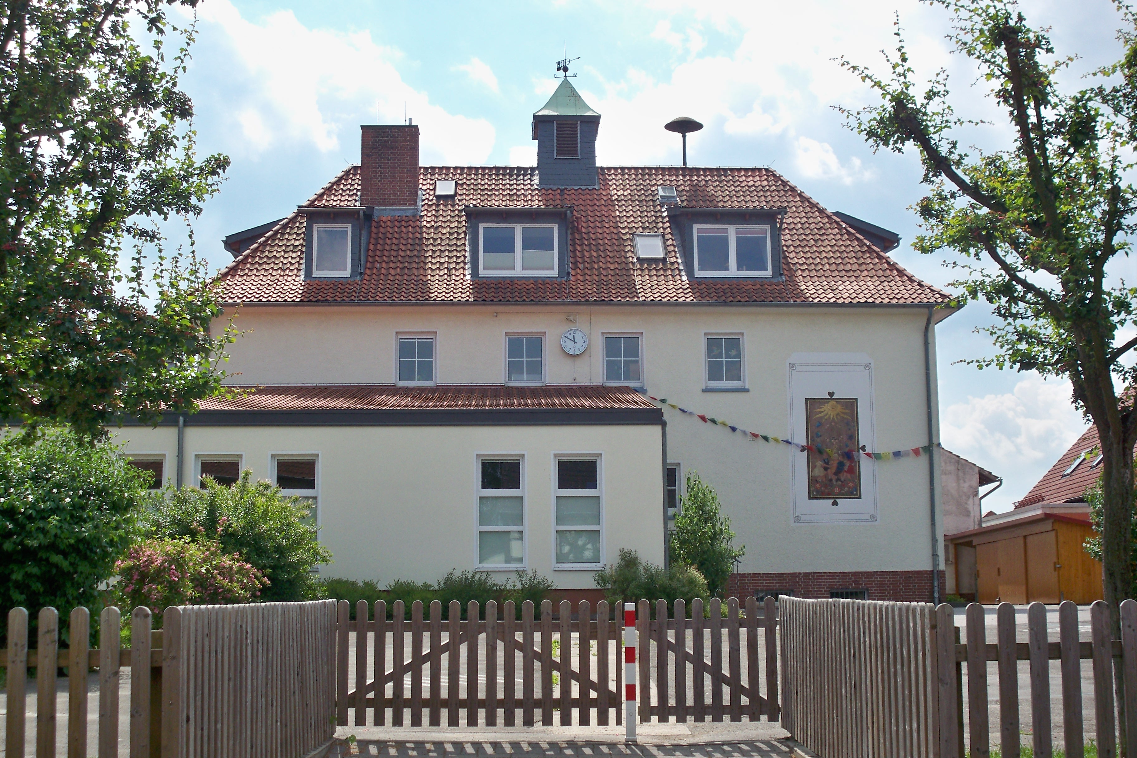 Wennigsen, Degersen, Alte Dorfschule